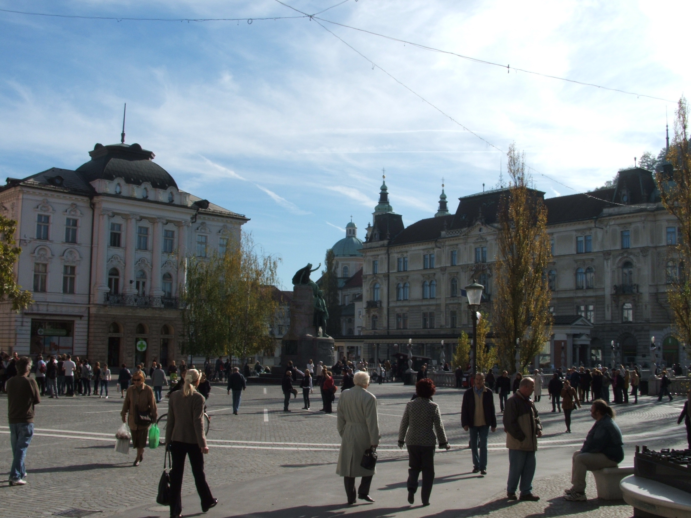 Ljubljana